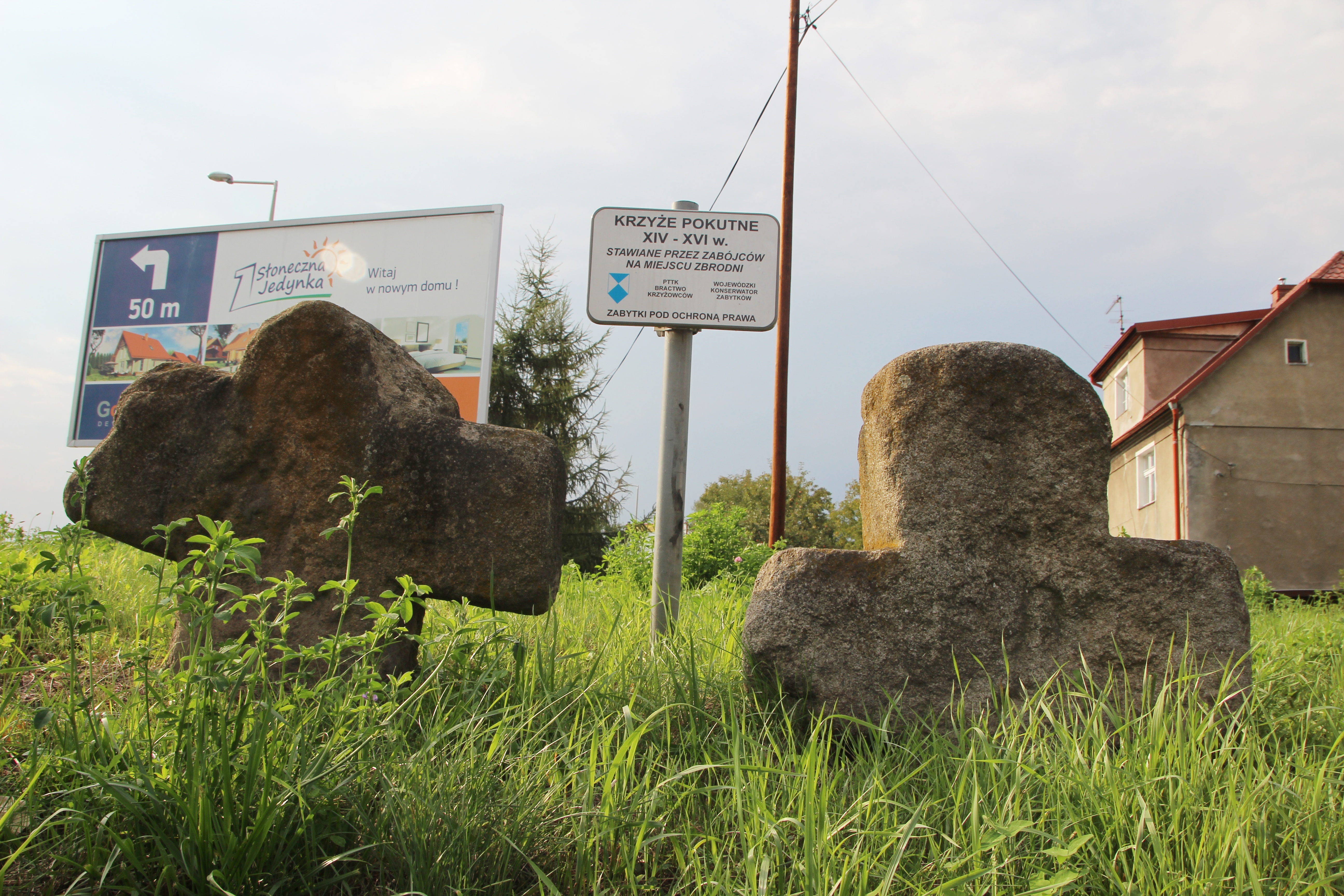 Jędrzychów – wieś w Polsce położona w województwie opolskim, w powiecie brzeskim, w gminie Nysa.